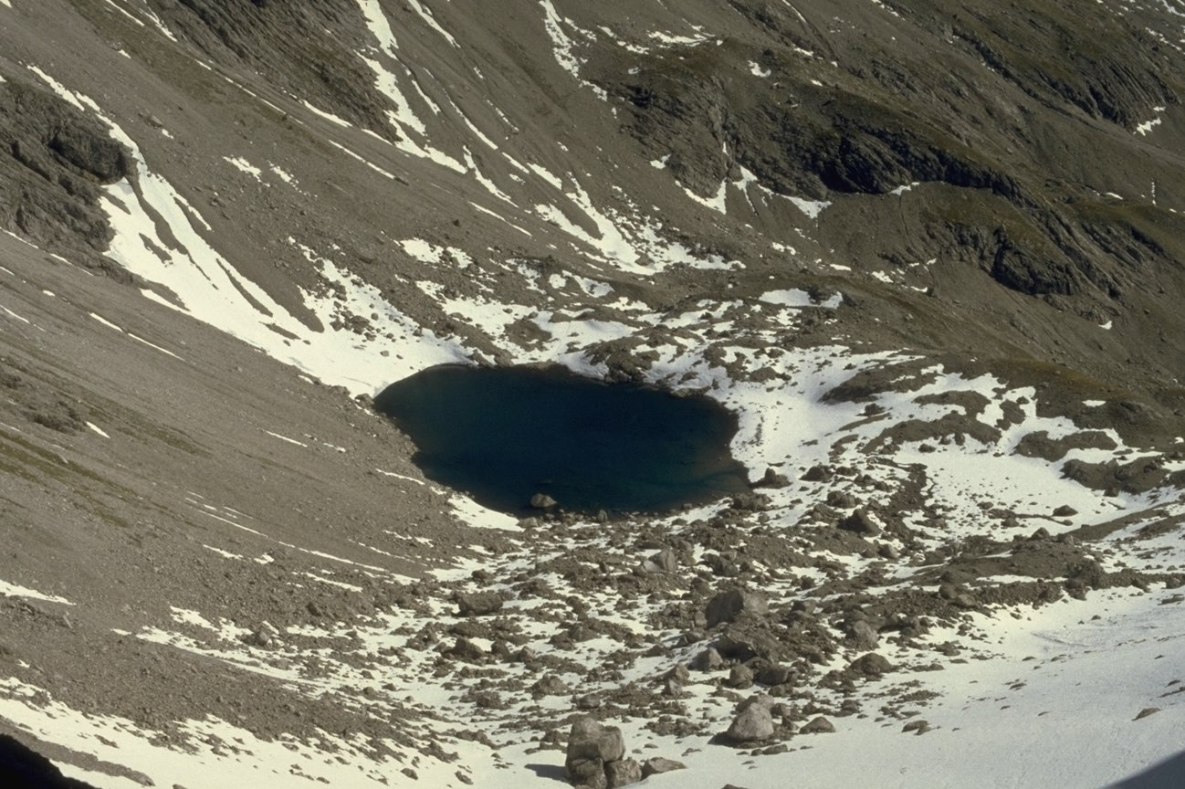 Hermannskarsee vom Nordgrat des Großen Krottenkopf